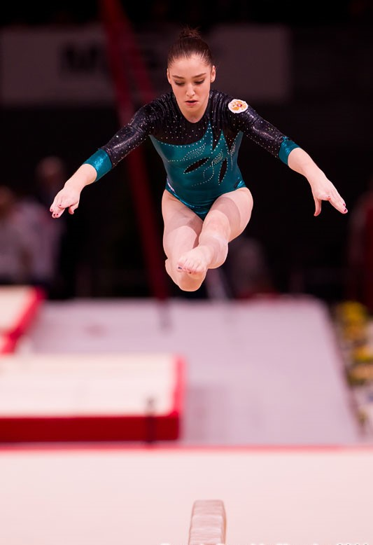 18èmes Internationaux de France de Gymnastique Artistique 2011. 4ème subdivision: Gymnastique Artistique Féminine - Poutre - Qualifications. Aliya MUSTAFINA (RUS). Palais Omnisport de Paris-Bercy, Paris. Samedi 19 mars 2011.